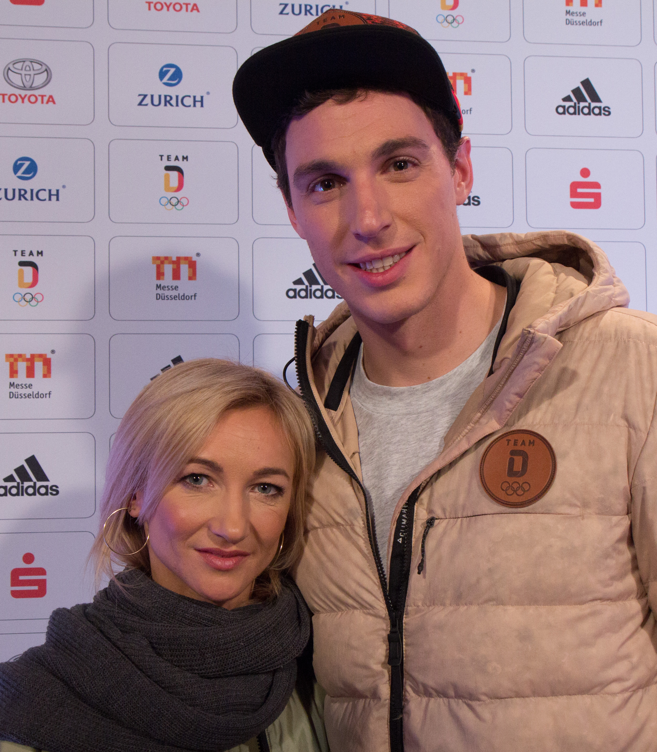 Präsentation der Bekleidung für PyeongChang am 2. November 2017 im Alten Kesselhaus des Areal Böhler in Düsseldorf. Aljona Savchenko und Bruno Massot